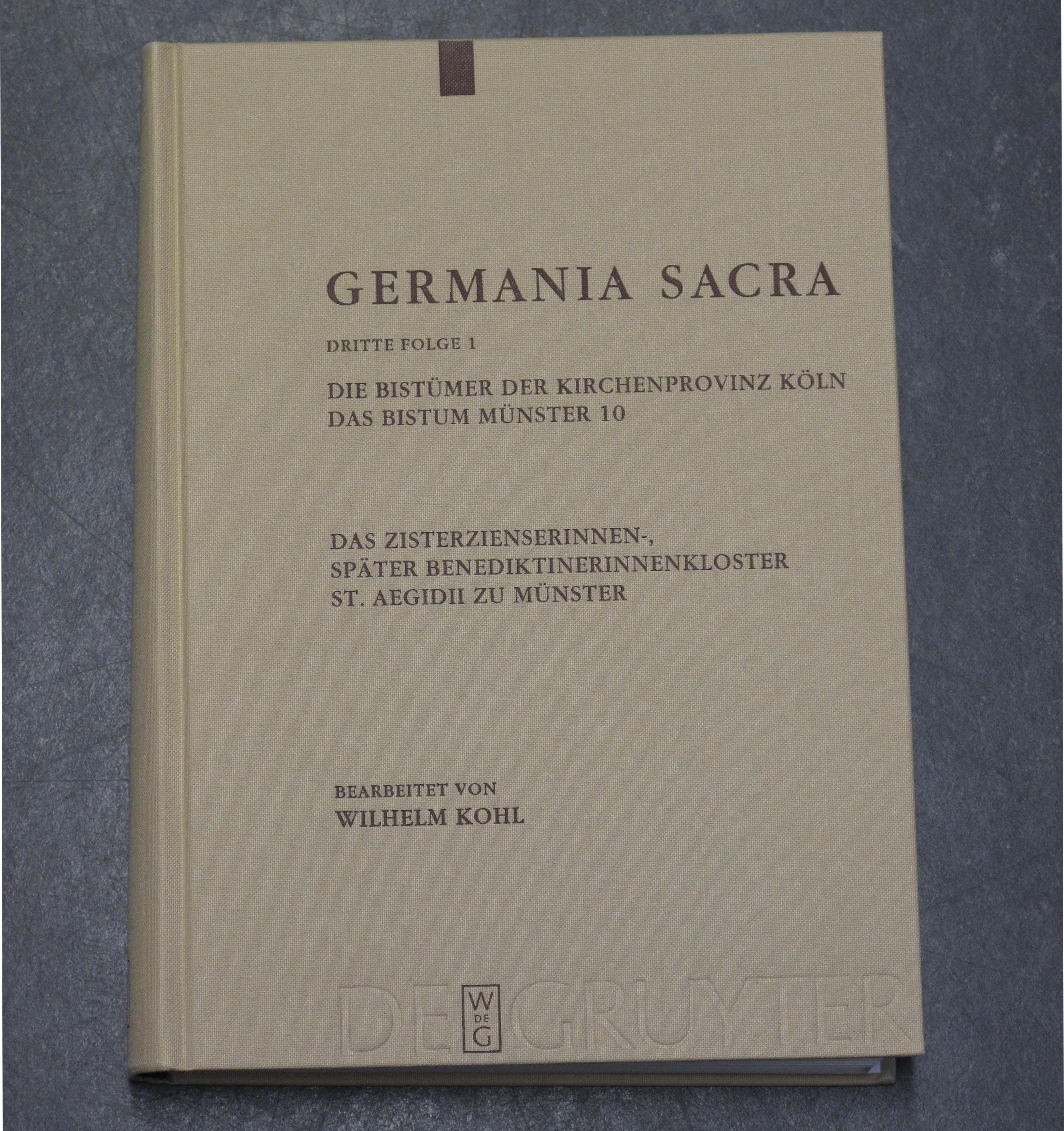 Wilhelm Kohl: Das Zisterzienserinnen-, später Benedikterkloster St. Aegidii zu Münster. Germania Sacra. Dritte Folge 1. Die Bistümer der Kirchenprovinz Köln. Das Bistum Münster 10. Berlin/New York 2009